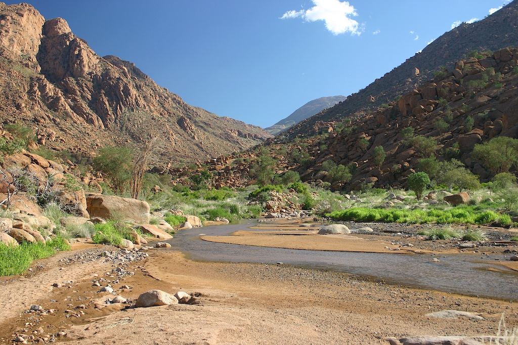 Brandberg, Tsisab Gorge